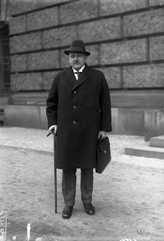 Berlin. Zu der Regierungskrise. Der Reichspostminister Dr. Höfle von seinem Amt entbunden. Infolge der Affäre Barmat. Konzern musste Reichspostminister Höfle sein Amt niederlegen. Unser Bild zeigt ihn nach dem Verlassen des Ministeriums. [Januar 1925; Text Bild 102-00961]